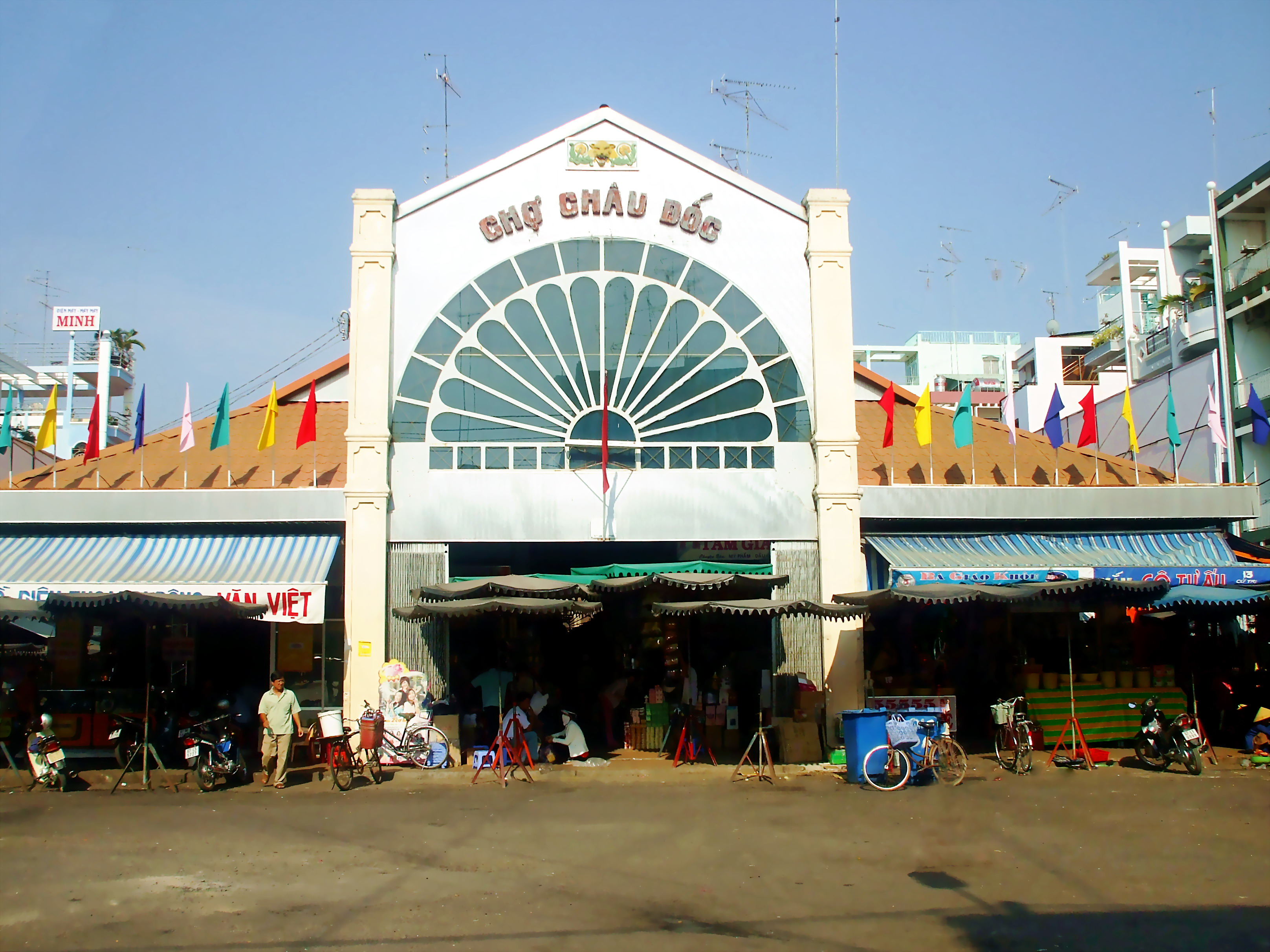 Nhà lồng chợ Châu Đốc ở An Giang, Việt Nam.